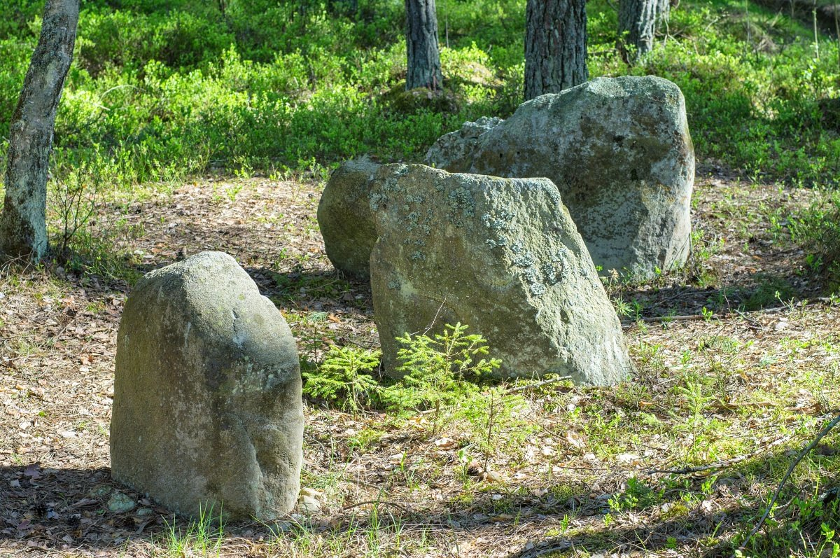 Каменныя валы сцебярацкія. Сцеберакі